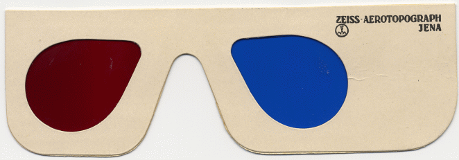 Farbfilterbrille_Rot_Blau Eingsaescannt am 6. November 2003